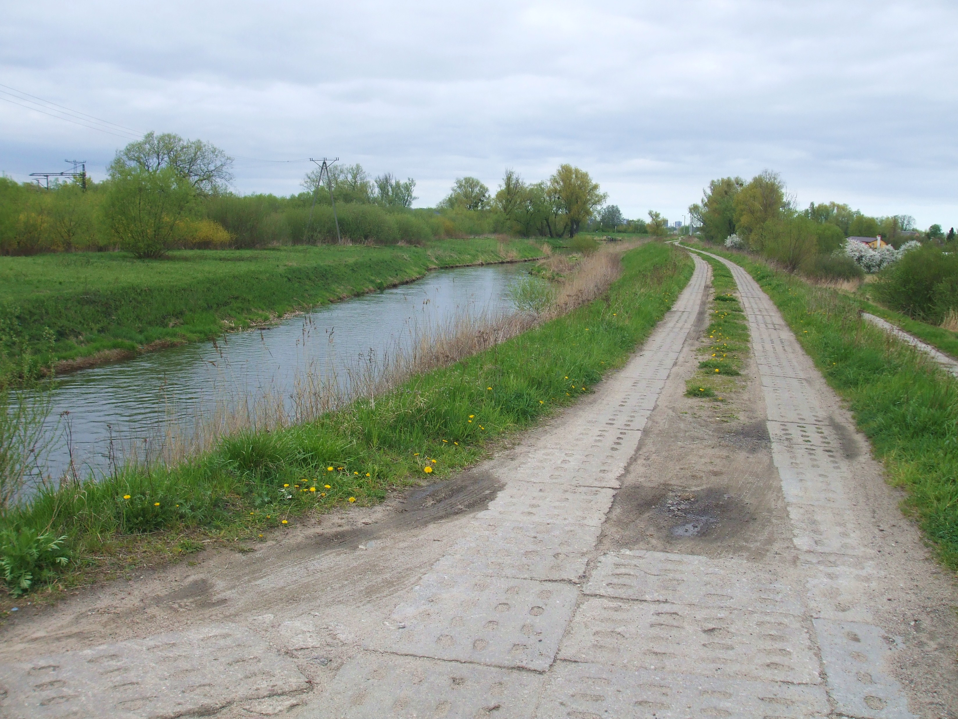 Gdańsk Orunia.